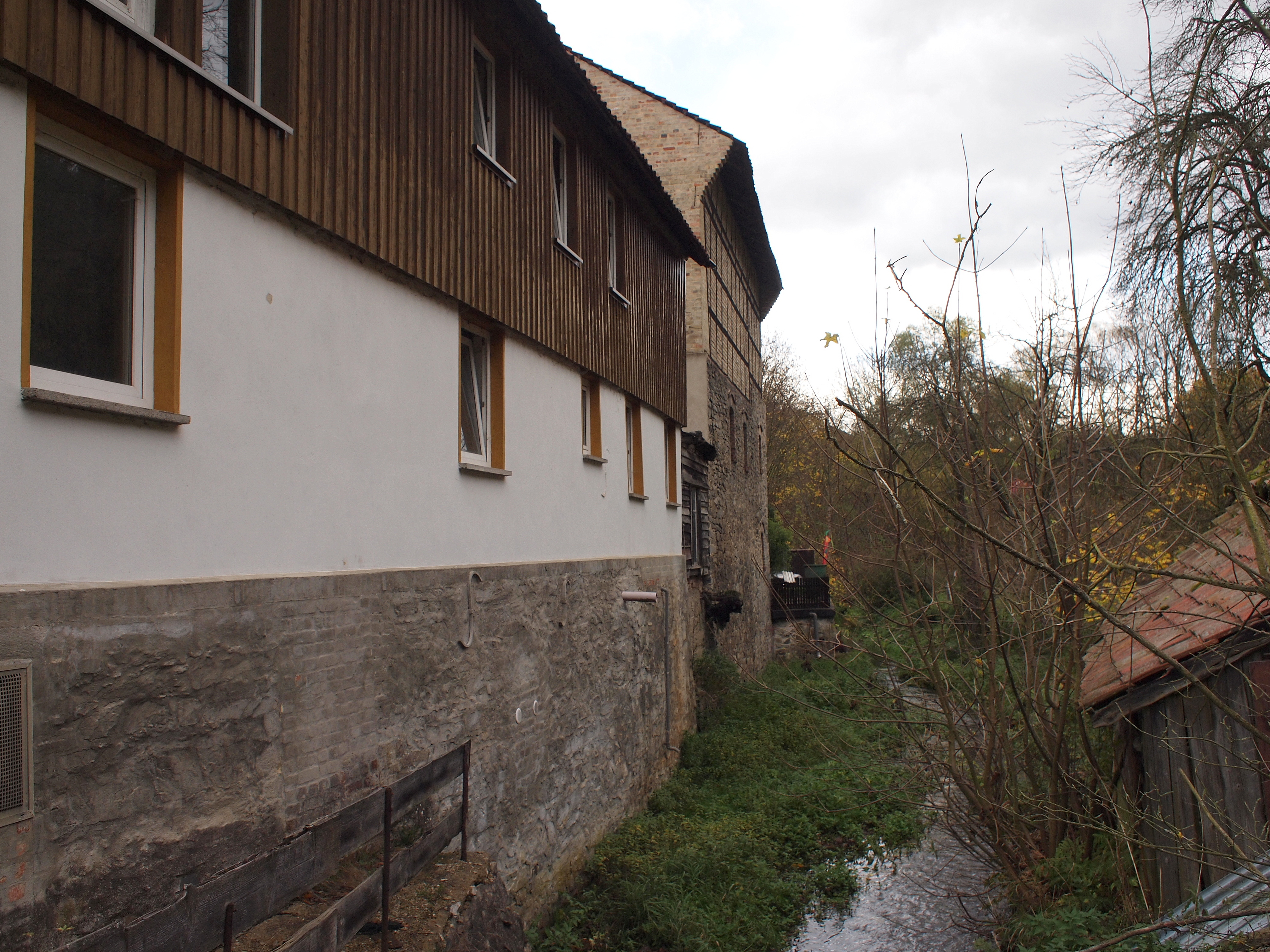 Altenbrak, Landkreis Harz, Sachsen-Anhalt; Rückseite des Gebäudes "Sankt Ritter 14" mit Graben